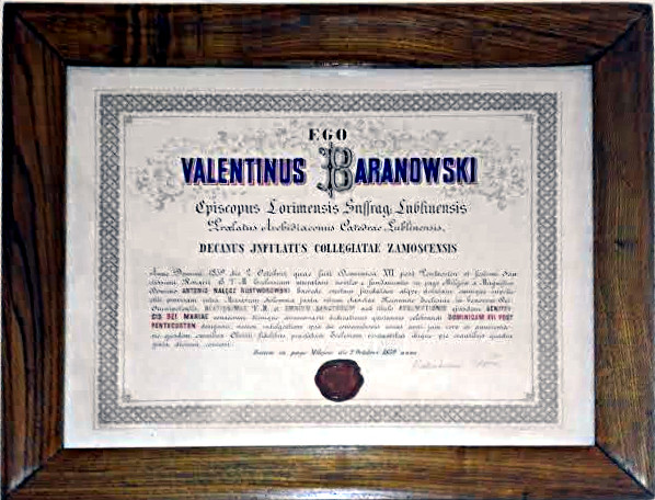 Akt konsekracji kościoła w Milejowie, dokonanej 2 X 1859 roku.